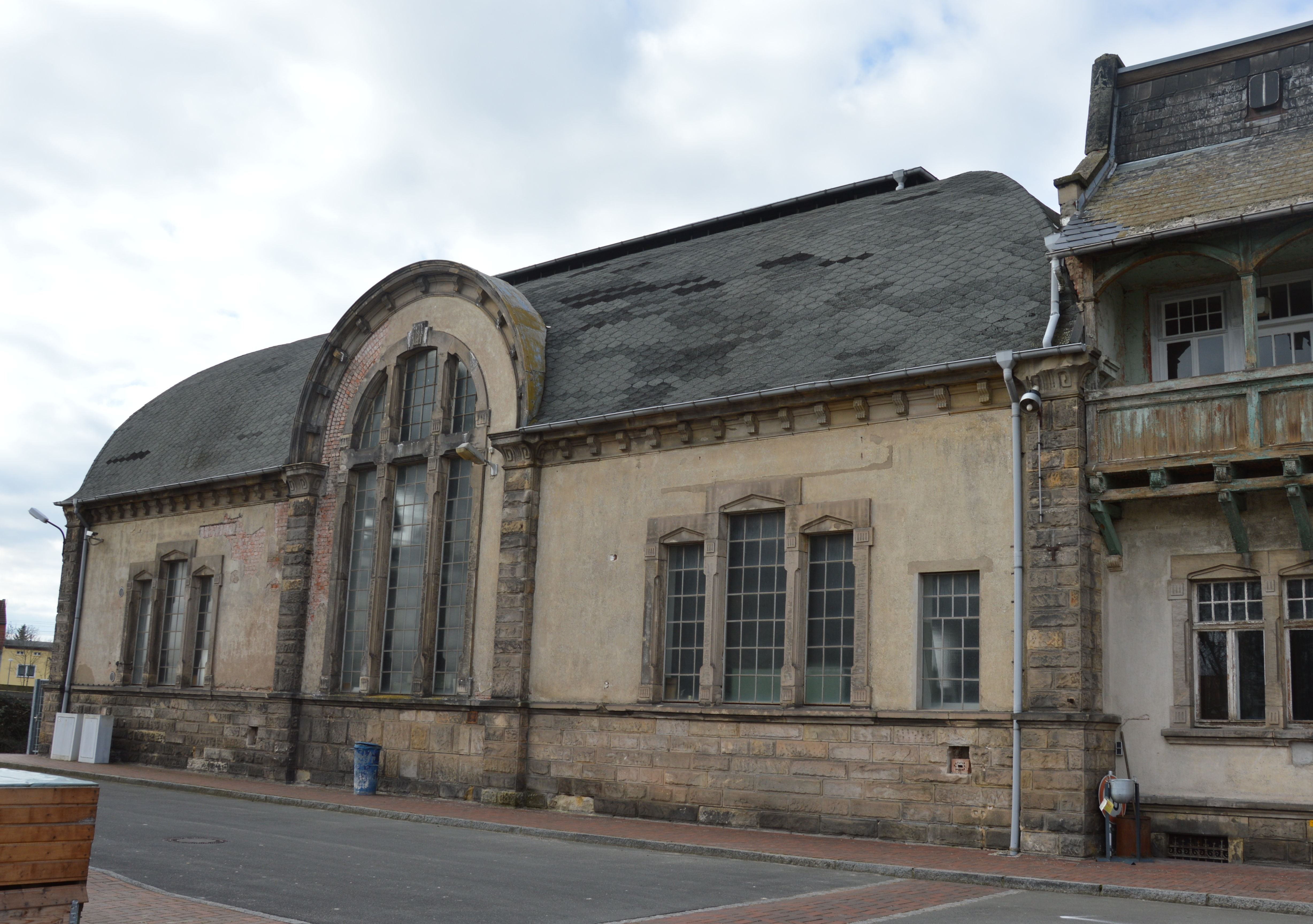 Umspannwerk Schönebeck